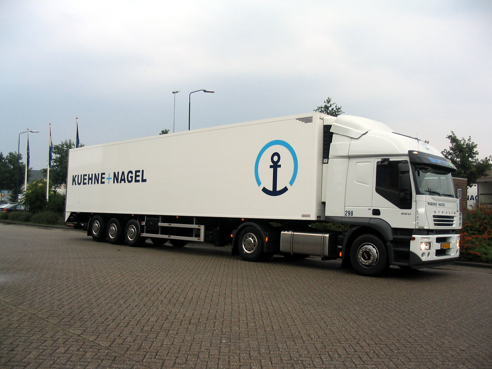 Iveco Stralis 420 AT Euro 5